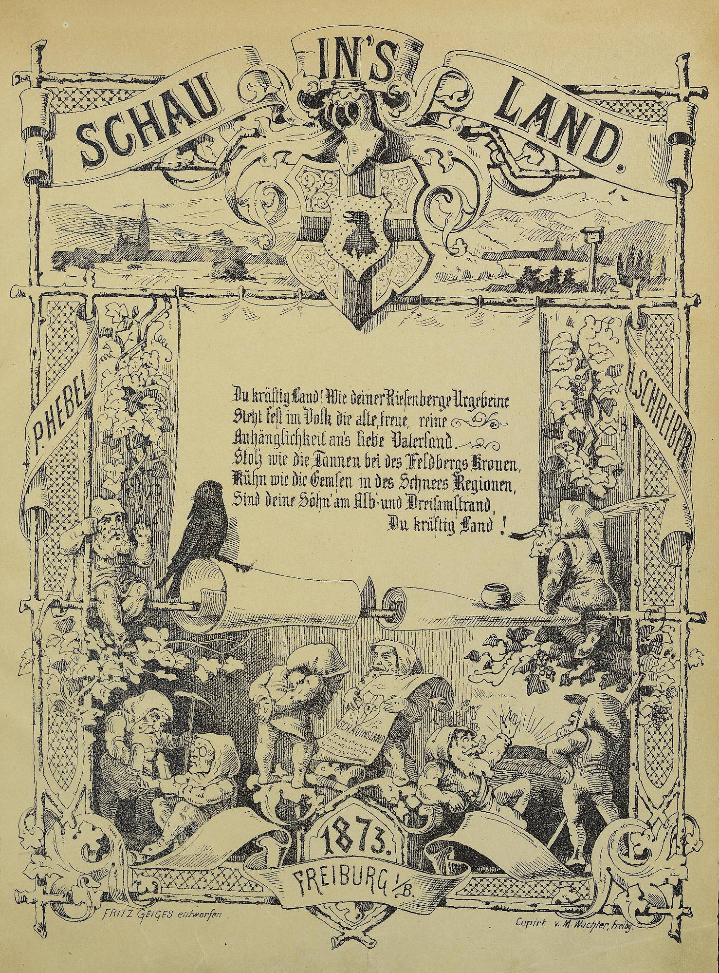 Titelseite der Zeitschrift / Title page of the periodical